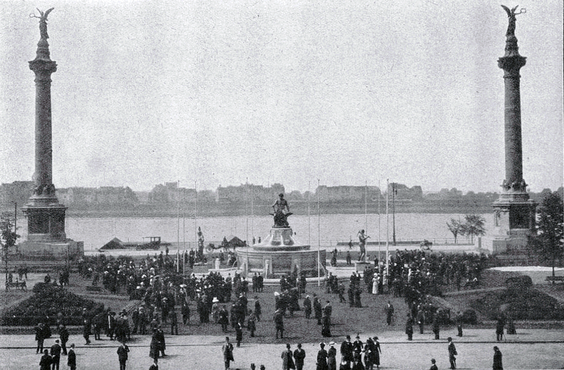 Der am 3. Mai enthüllte Brunnen vor dem Ausstellungspalast in Düsseldorf, den die Großindustrie von Rheinland und Westfalen zum Andenken an die Ausstellung 1902 gestiftet hat. (Architekt Gotthold Nestler, Bildhauer Friedrich Coubillier.) Foto Julius Söhn